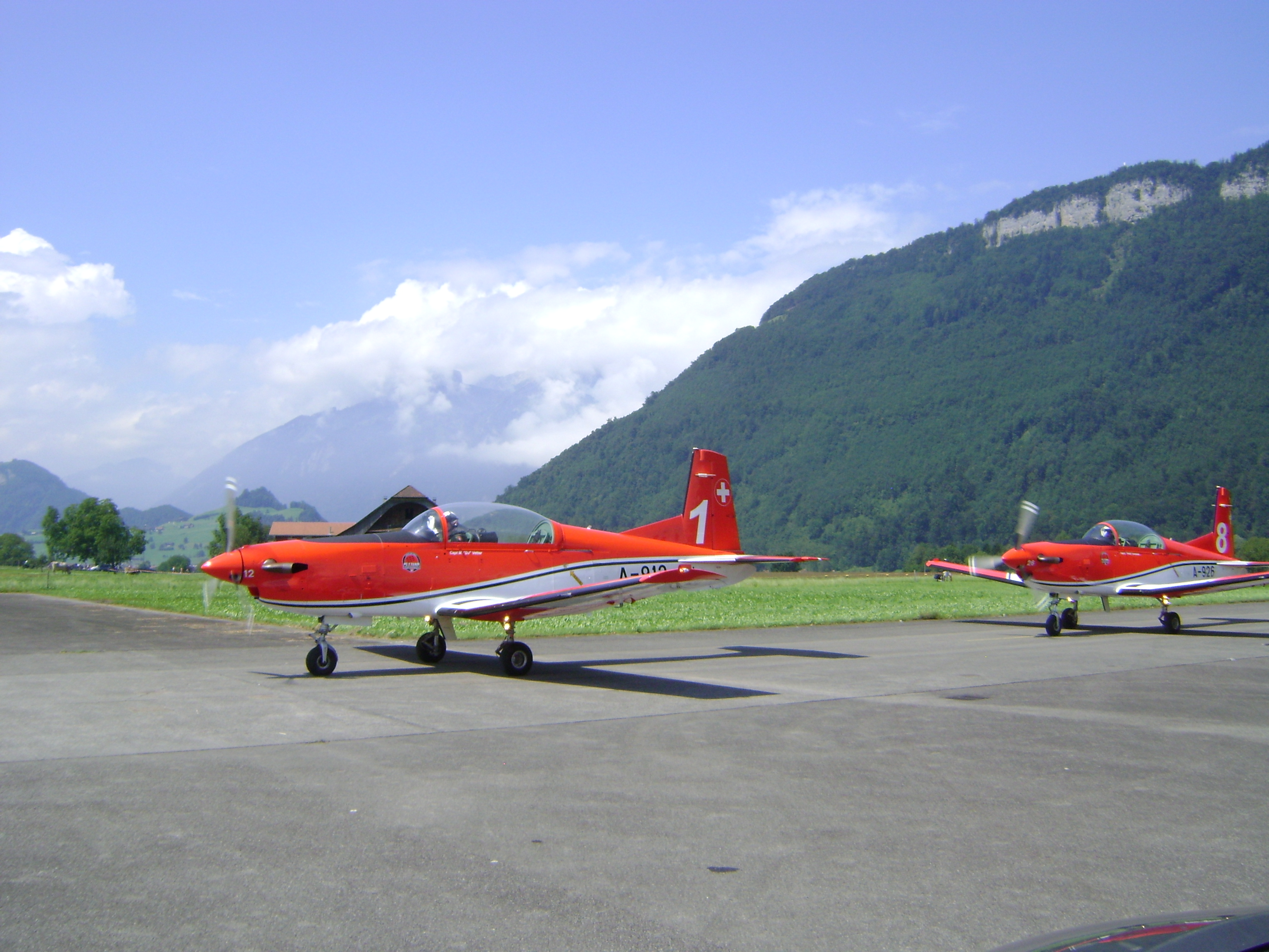 PC-7Team4